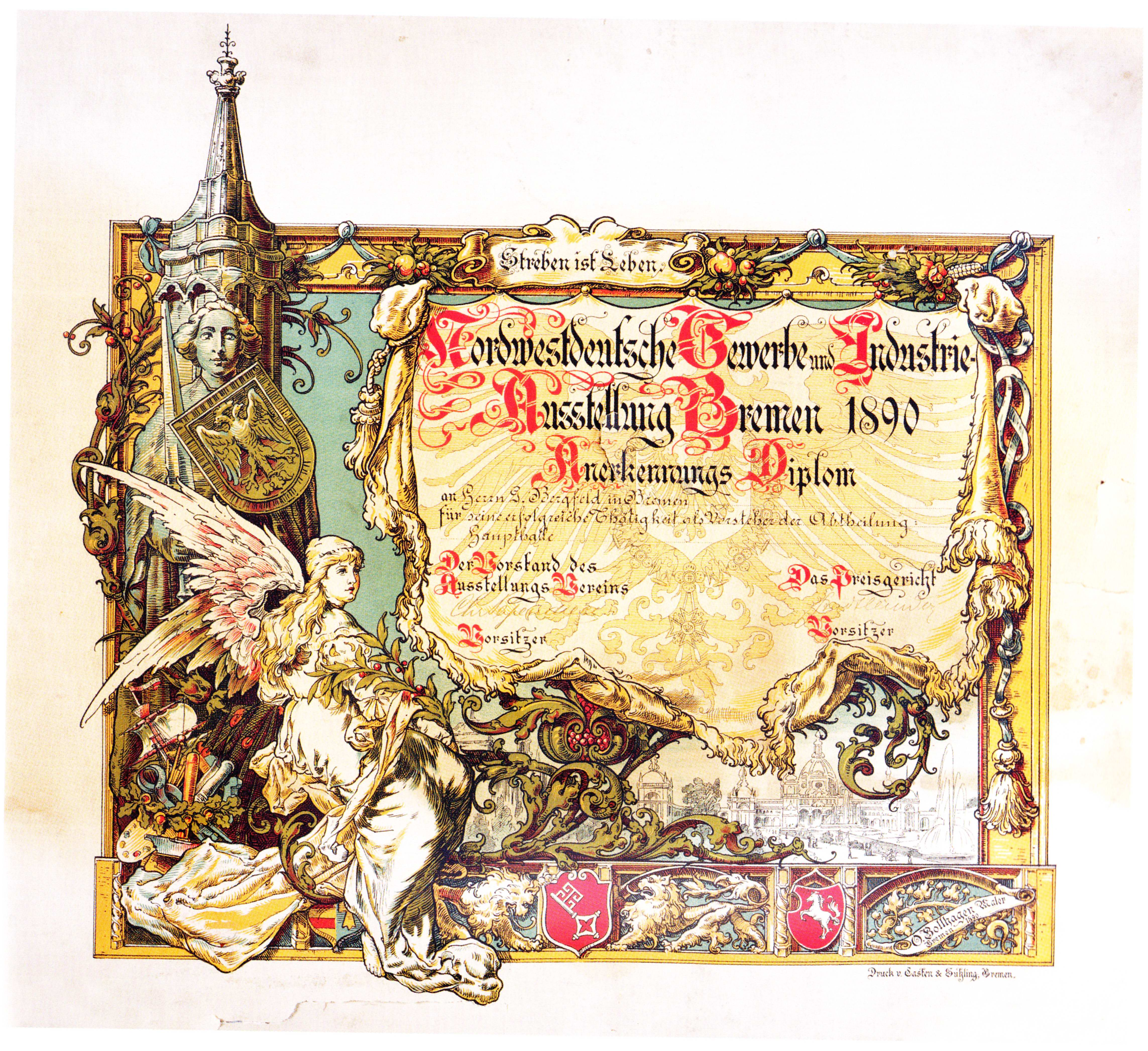 Anerkennungsurkunde der Nordwestdeutschen Gewerbe-und Industrie-Ausstellung Bremen 1890 für G.Bergfeld. Entwurf: Otto Bollhagen.